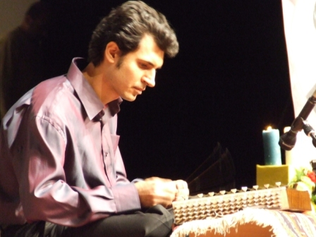 Simak Aghaei-Santournavaz-bozorgdashte meshkatian-talare andishe sale 85